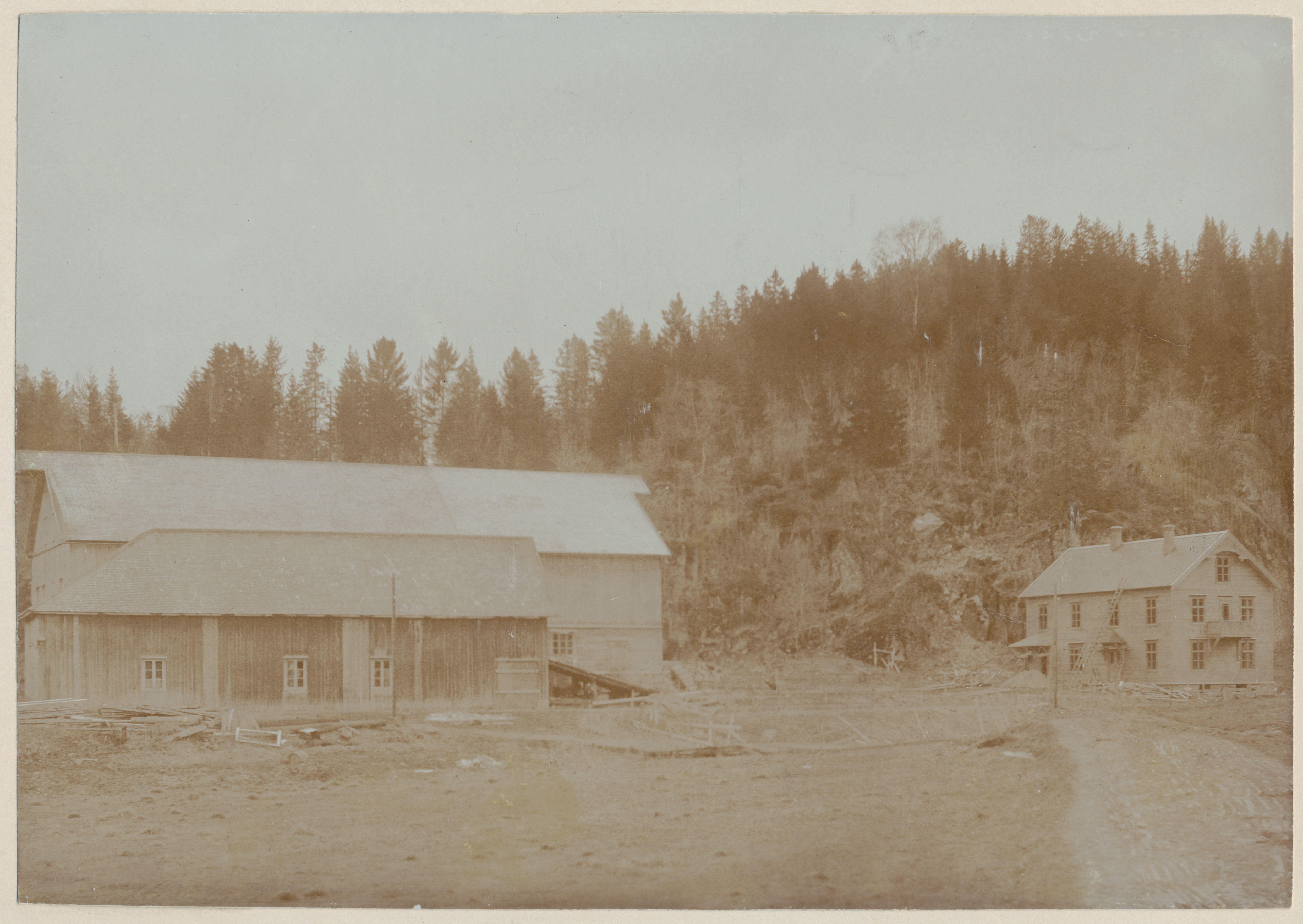 Gårdstunet i Hopla (227-1) i Åsen, fotografert ca. 1913. Våningshuset til høyre er ennå ikke ferdigbygd, og står umalt. Det ble bygd her etter at det gamle våningshuset, som stod en del lenger vest (til venstre for bildekanten) brant i 1911. Fjøset i bakgrunnen var også forholdsvis nytt, bygd 1907-10 etter at det forrige fjøset brant i oktober 1906. Se Bygdebok for Åsen bind 4, s. 150-170. Fotograf / Photographer: Ukjent Fotoeier / Photo owner: Tore Haabeth Digitalisering / Digitizing: Arne Langås Foto-ID / Photo ID: 094-0003 Har du utfyllende opplysninger? Legg gjerne igjen en kommentar nedenfor eller send e-post til . | Do you have additional information? Please leave a comment below or send an e-mail to .